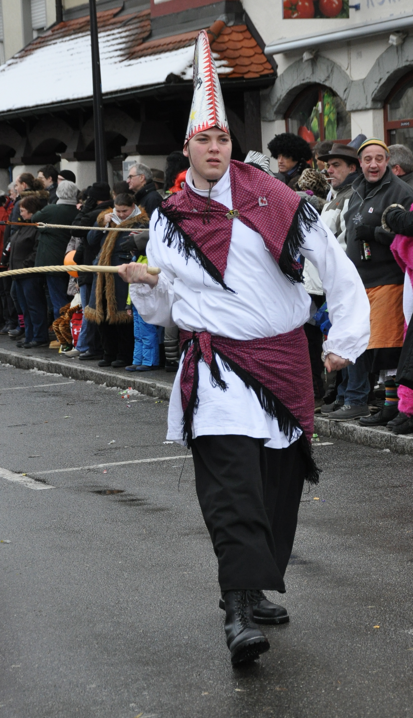 Teilnehmer der Schneller-WM: Kneller der Narrenzunft Empfingen Fotografiert beim Landschaftstreffen der Vereinigung Schwäbisch-Alemannischer Narrenzünfte (VSAN) 2015 in Weingarten; Narrensprung am Sonntag, 25. Januar 2015